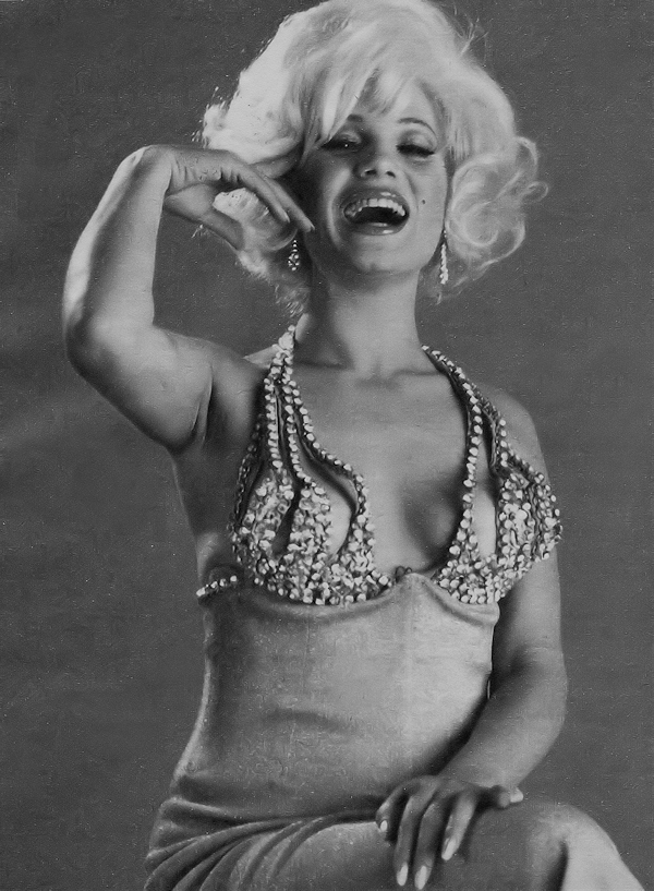 La actriz argentina Mimí Pons como Marilyn Monroe, en la Revista Siete Días Ilustrados